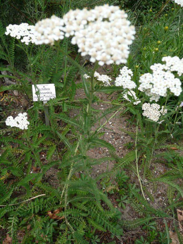 Achillea in Botanischer Garten Erlangen, 2008